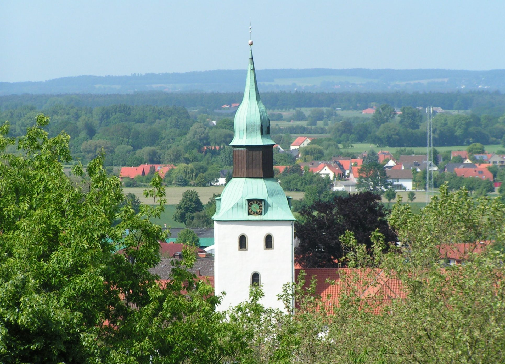 Blick über Bad Essen. Im Hintergrund der Stemweder Berg